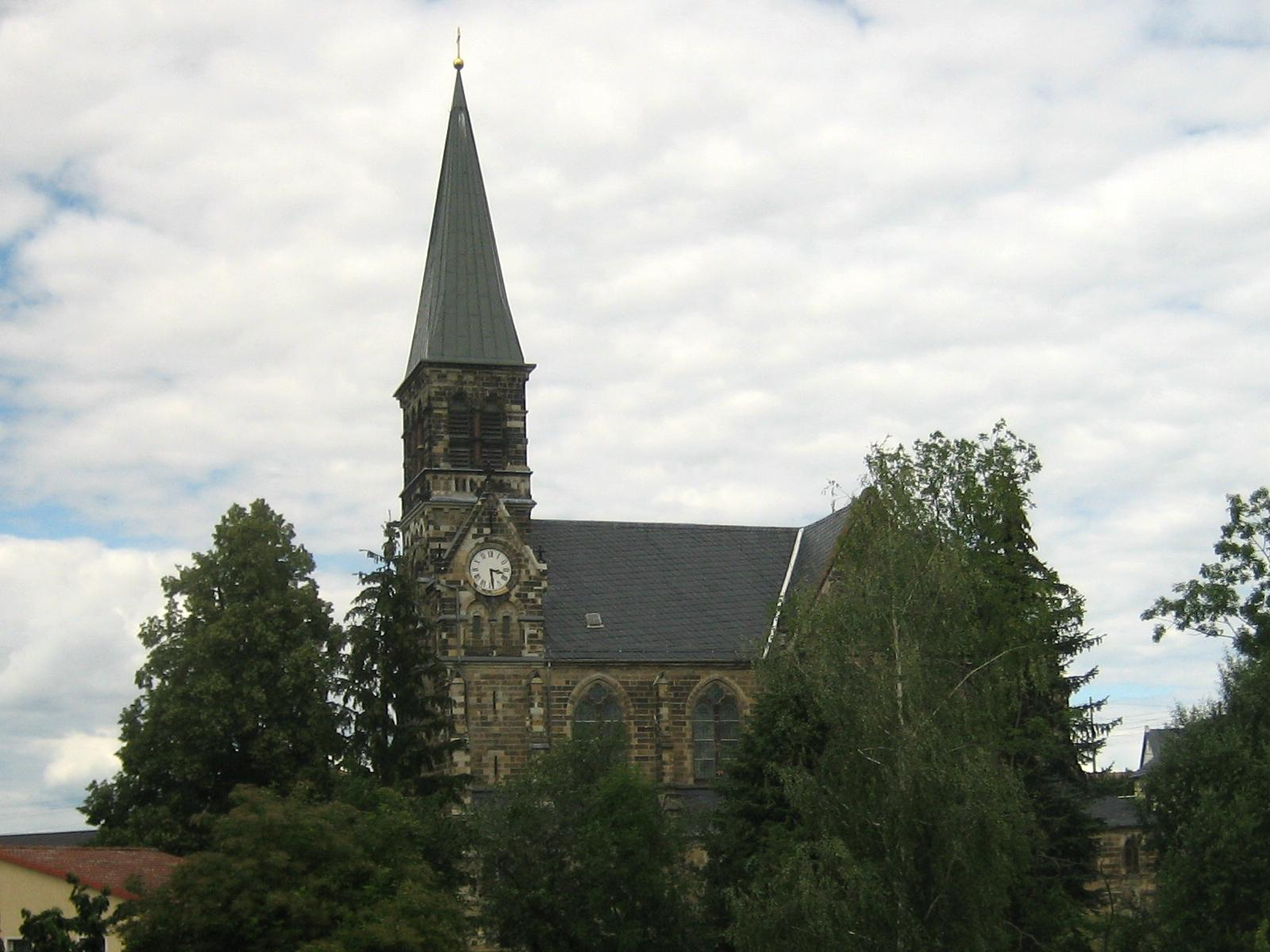 Kirche Großdobritz, erbaut 1881/82 in neugotischem Stil